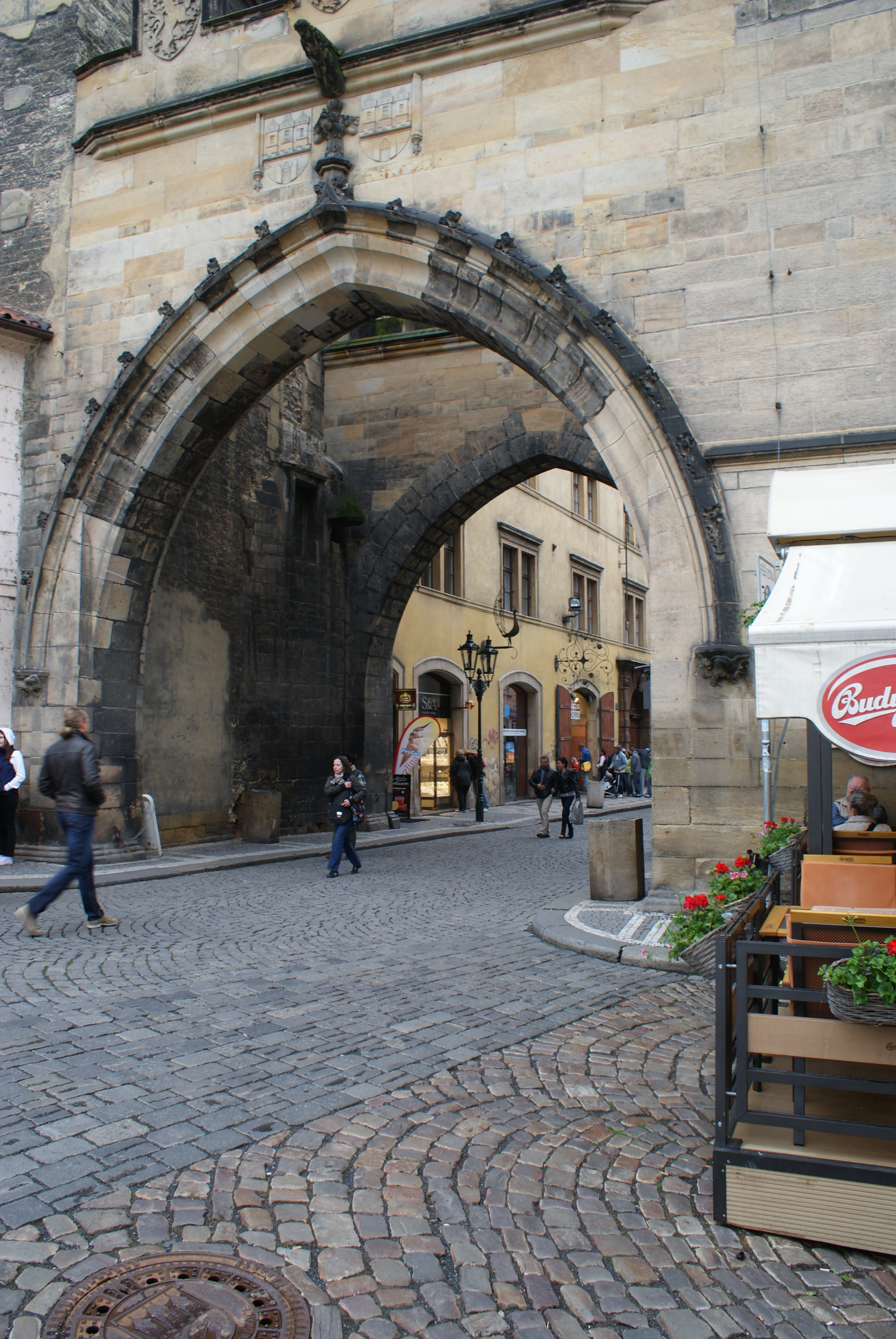 У Празе